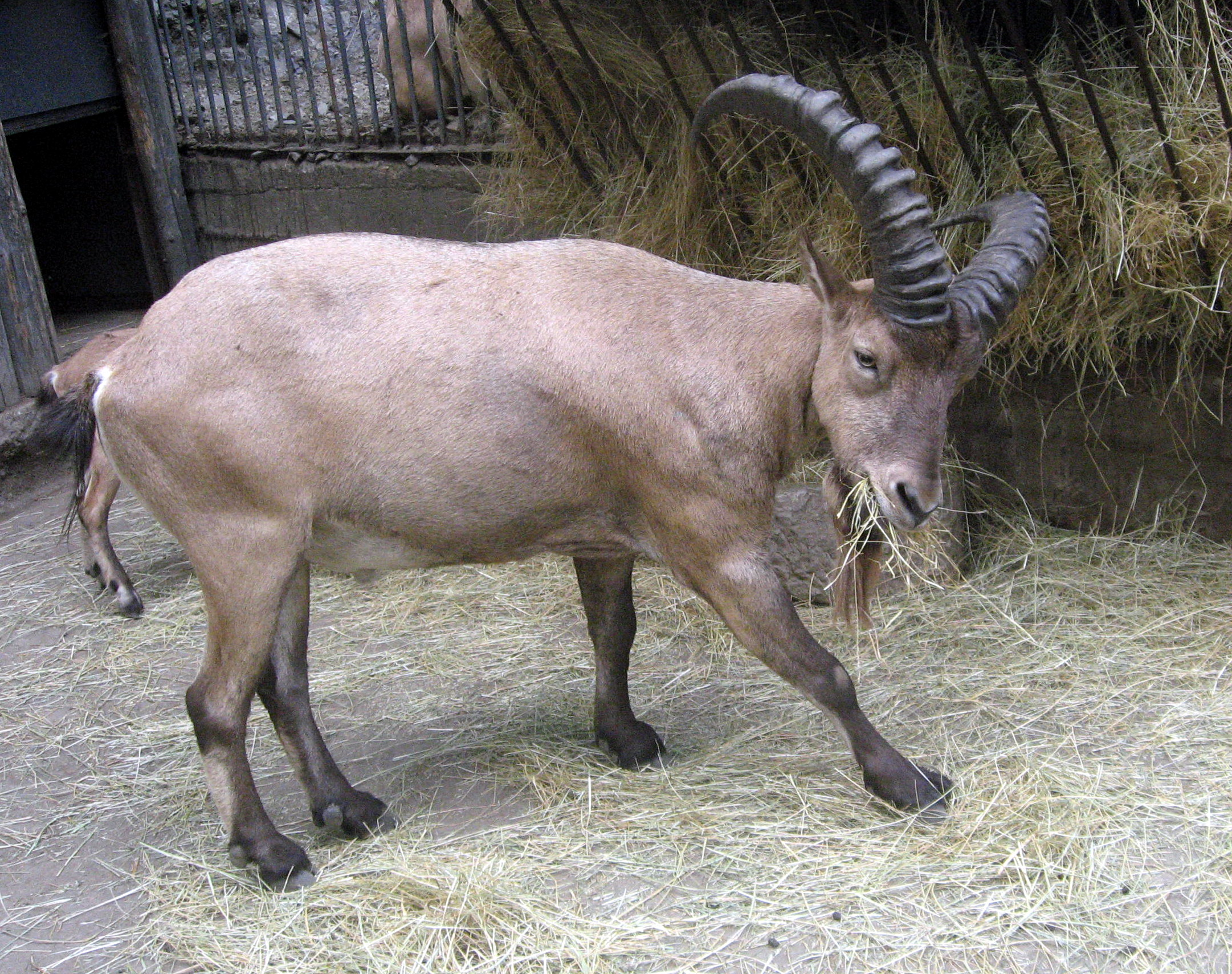 Kozorožec kavkazský